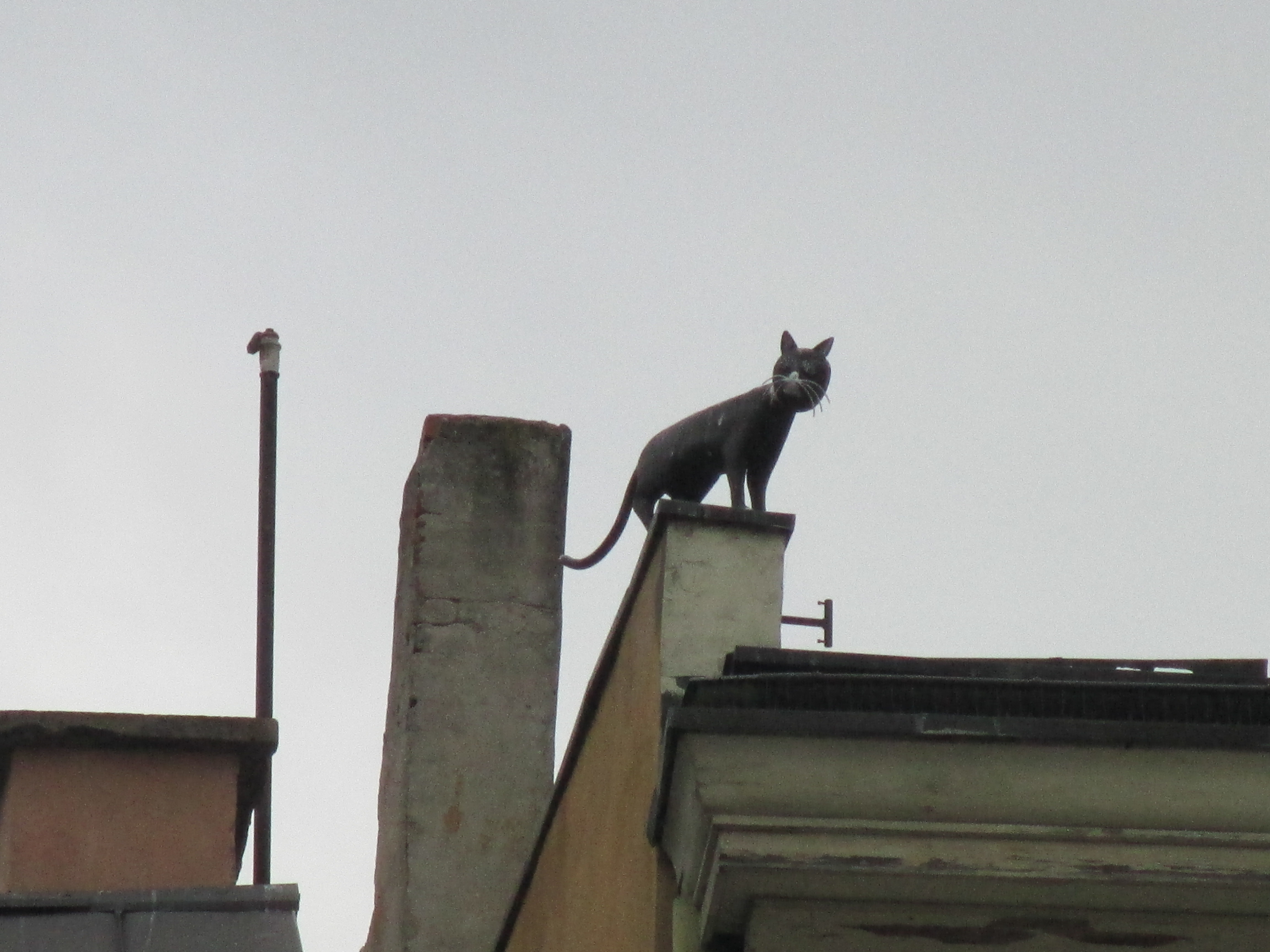 פסל בטורון של החתול שהציל את טורון